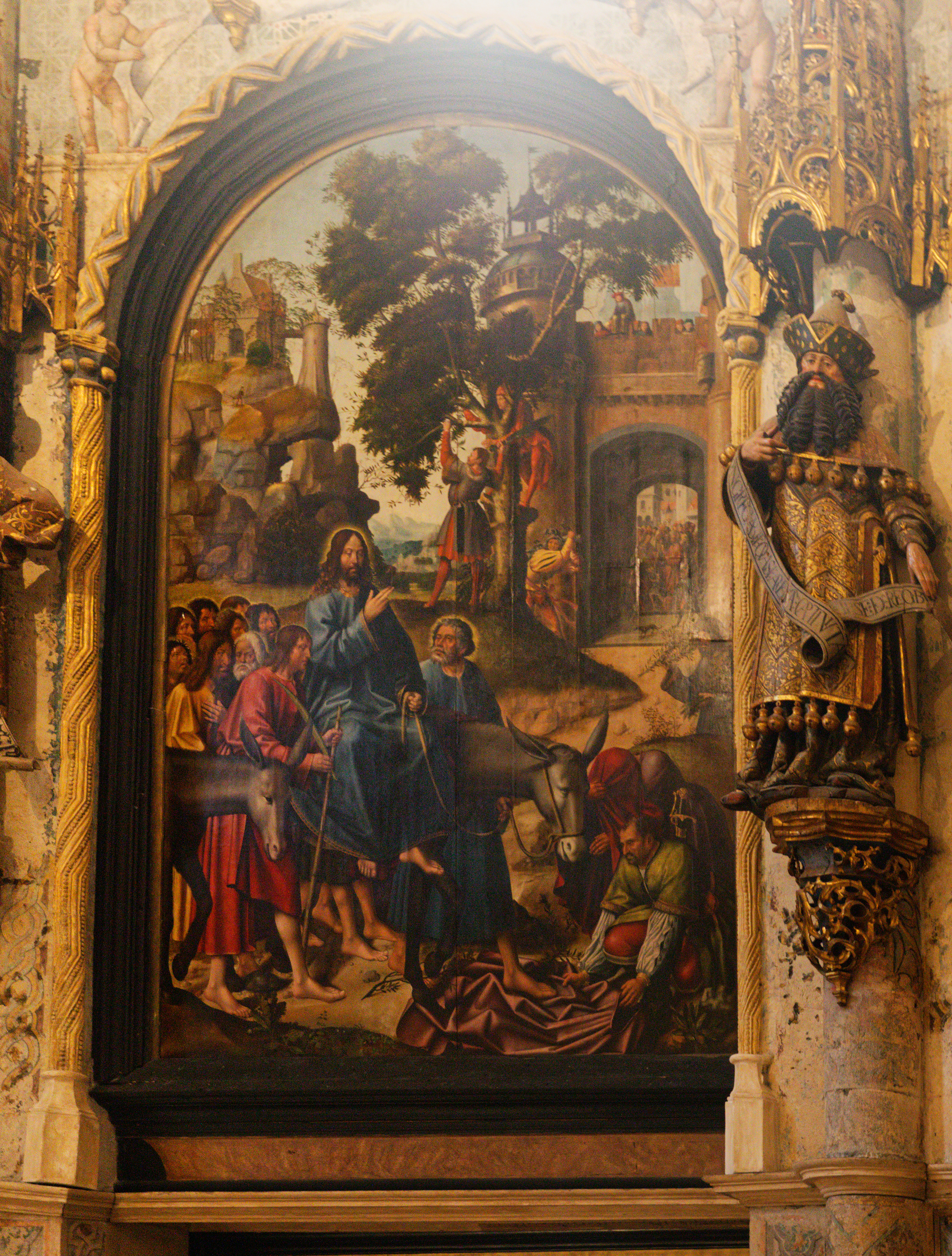 Jesus' entry into Jerusalem.